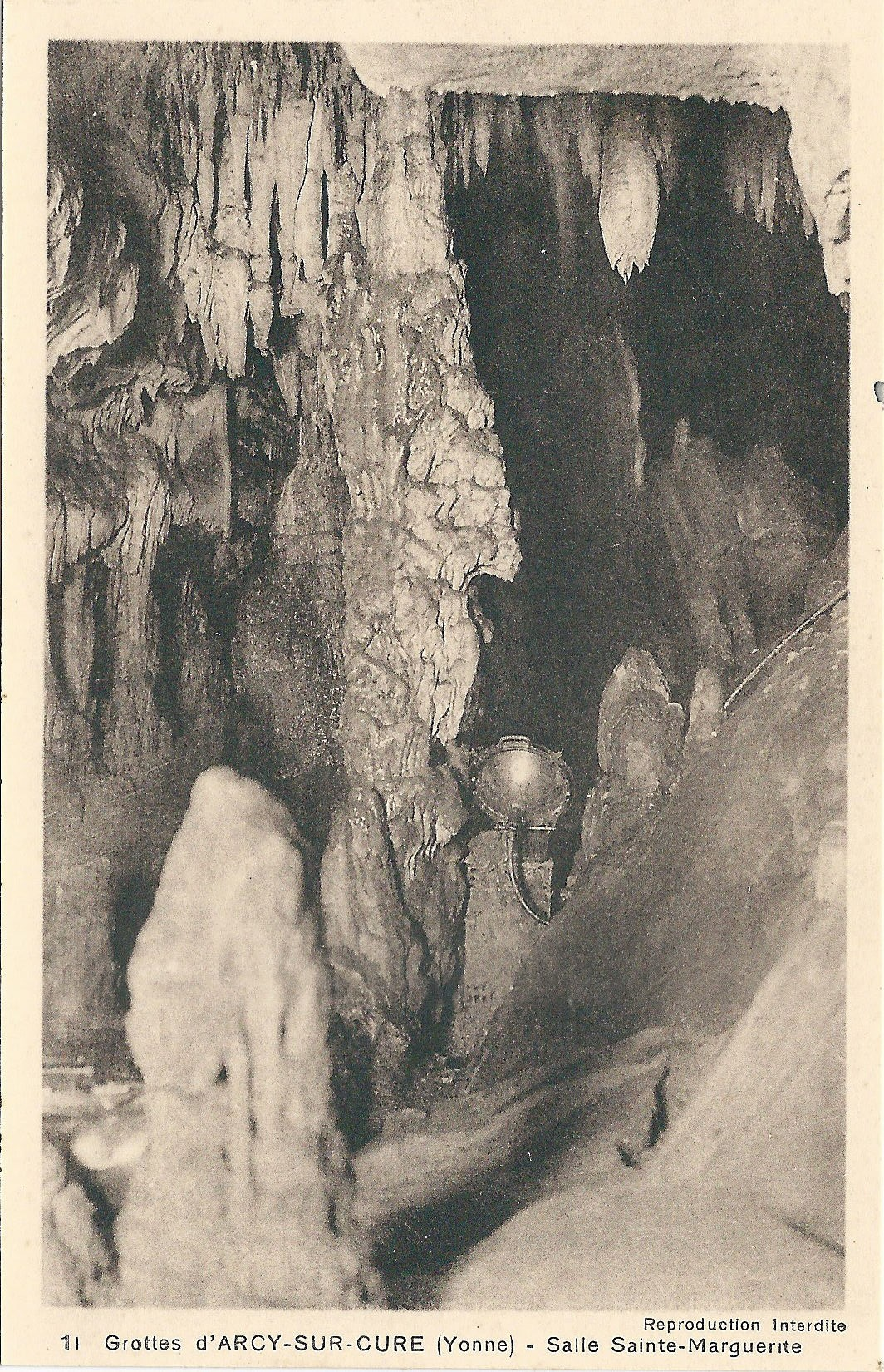 Grande grotte, site d'Arcy-sur-Cure, Yonne, Bourgogne, France ; concrétions dans la salle anciennement nommée "salle Sainte-Marguerite". Carte postale, vers 1937 (et avant 1939)